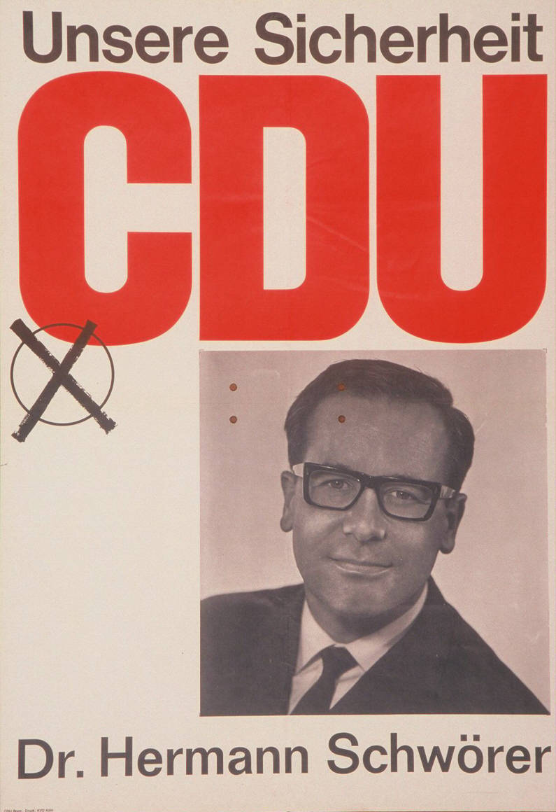 Unsere Sicherheit CDU Dr. Hermann SchwörerAbbildung:Porträtfoto - StimmkreuzPlakatart:Kandidaten-/Personenplakat mit PorträtAuftraggeber:CDU BonnDrucker_Druckart_Druckort:KVD KölnObjekt-Signatur:10-001: 1122Bestand:Plakate zu Bundestagswahlen (10-001)GliederungBestand10-18:Plakate zu Bundestagswahlen (10-001) » Die 5. Bundestagswahl am 19. September 1965 » CDU » Mit PorträtfotoLizenz:KAS/ACDP 10-001: 1122 CC-BY-SA 3.0 DE